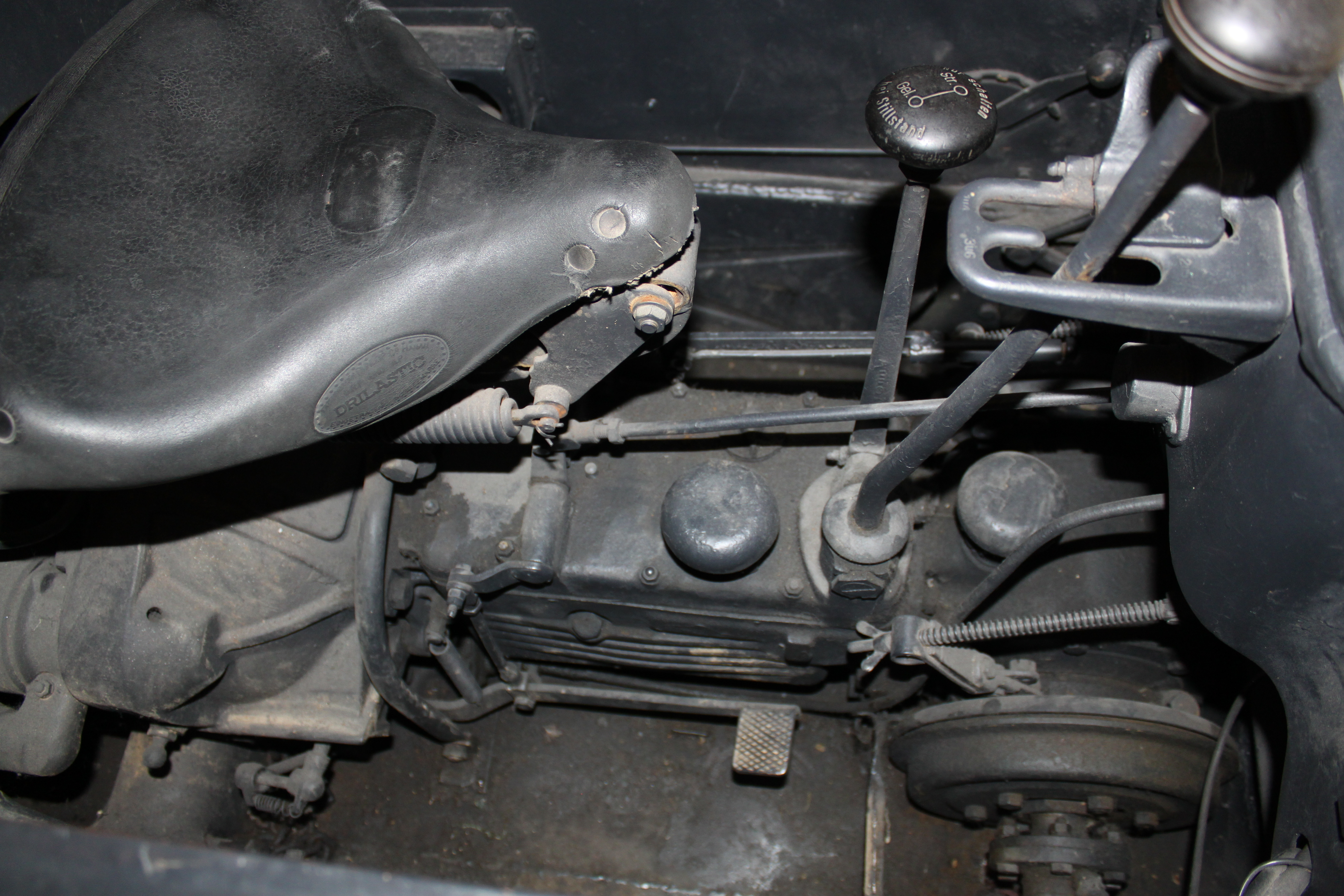 Blick auf den Getriebetunnel eines Krads, aufgenommen im Heeresgeschichtlichen Museum Wien